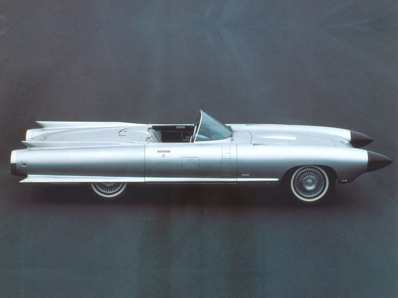 1960_Cadillac_Cyclone_Concept_Car_Side